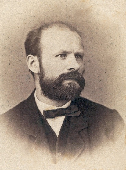 1871 Porträtfotografie von Carl Richard Ritter (1836-1917), Instrumentenbauer und später Besitzer der Pianofabrik in Merseburg, dann Halle. Carte-de-Visite-Aufnahme von Friedrich Wilhelm Naumann, Merseburg, den 5 März 1871. Diese Fotografie befindet sich im Kulturhistorisches Museum Schloss Merseburg